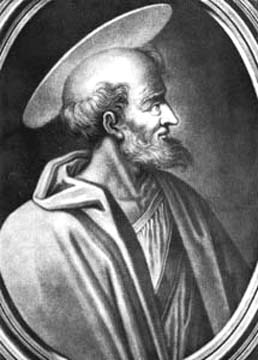 Immagine tratta da